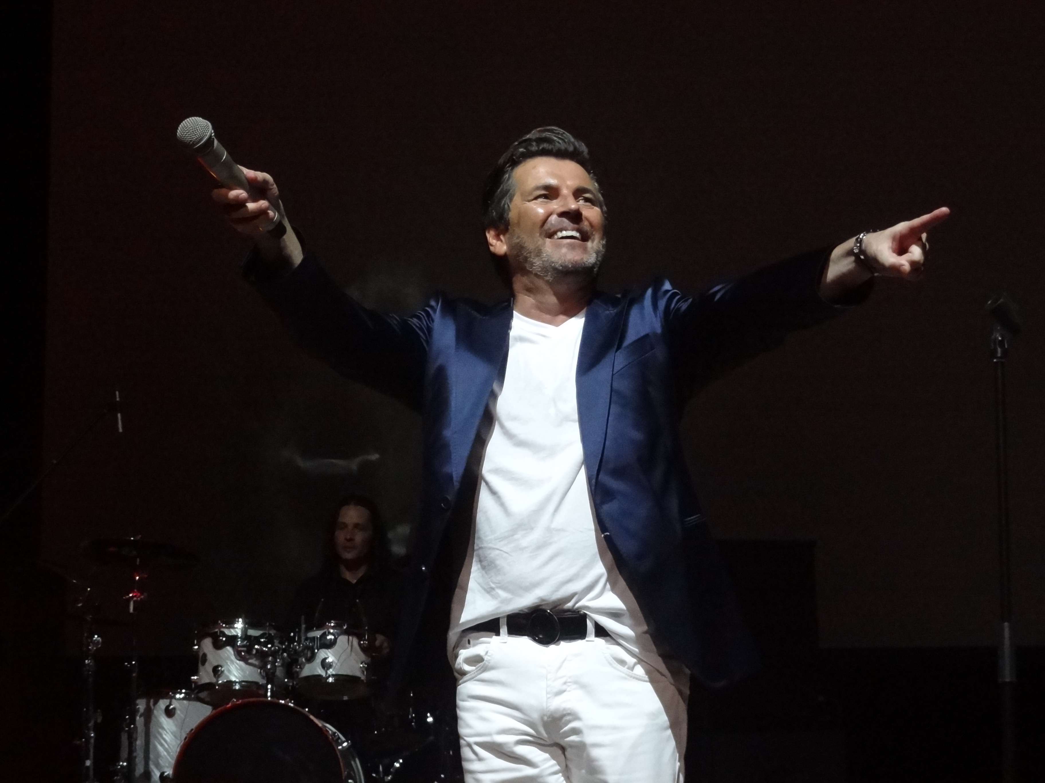 Концерт Томаса Андерса в Сочи.